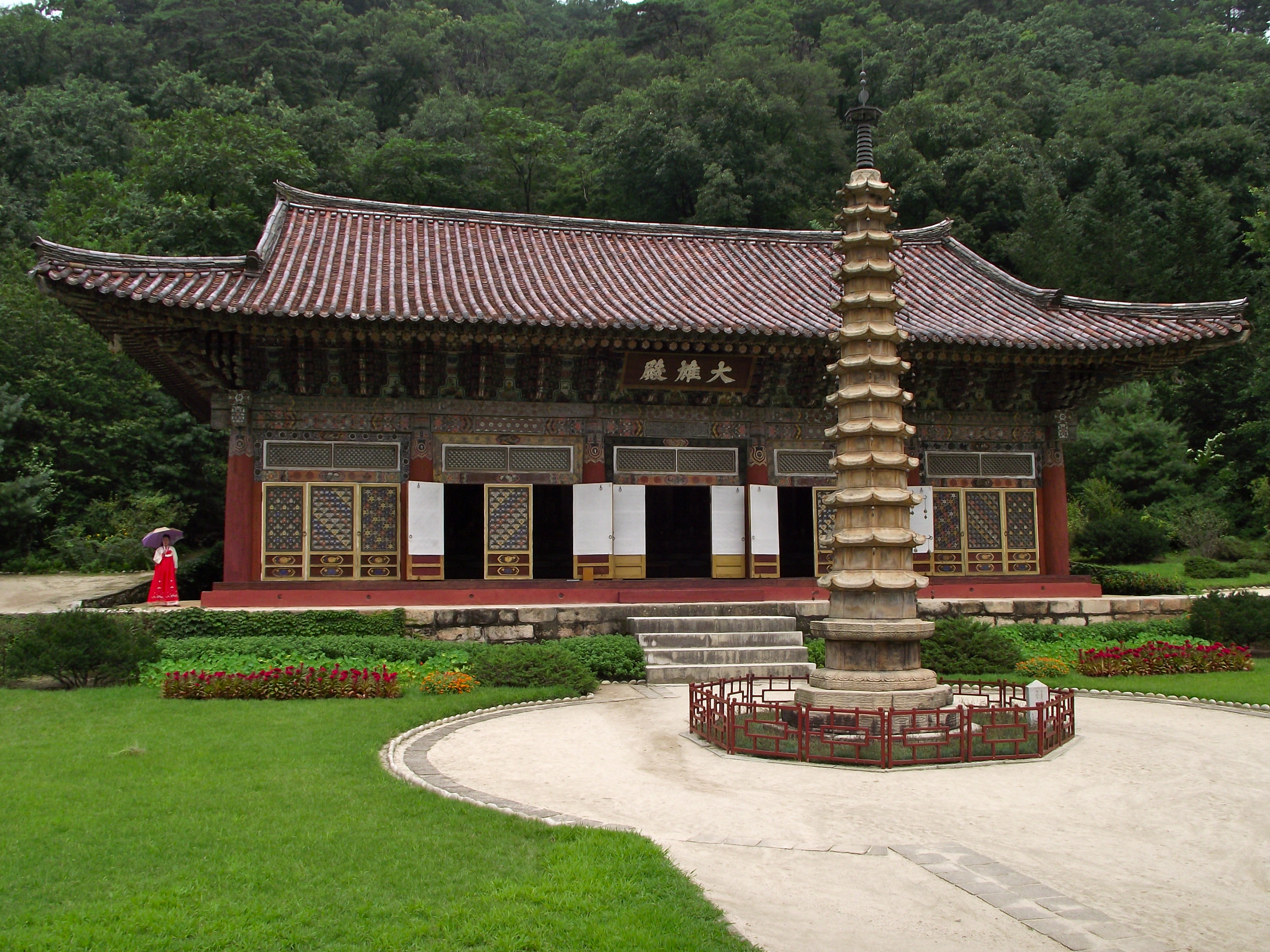 Pohyon Temple, Mount Myohyang